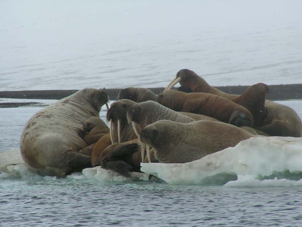 Walrosse auf einer Eisscholle (Franz-Josef-Land)